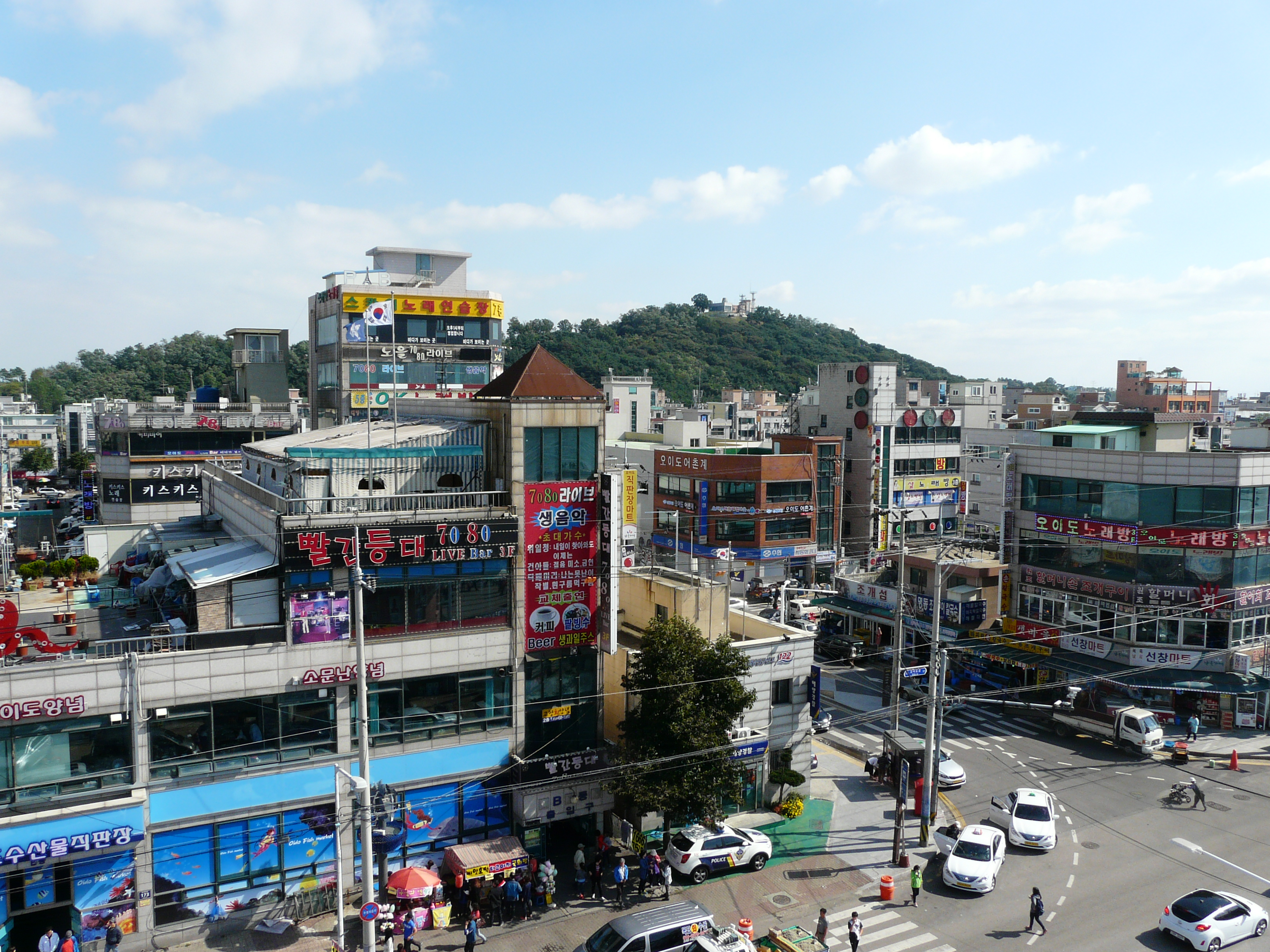 Siheung, October 2014